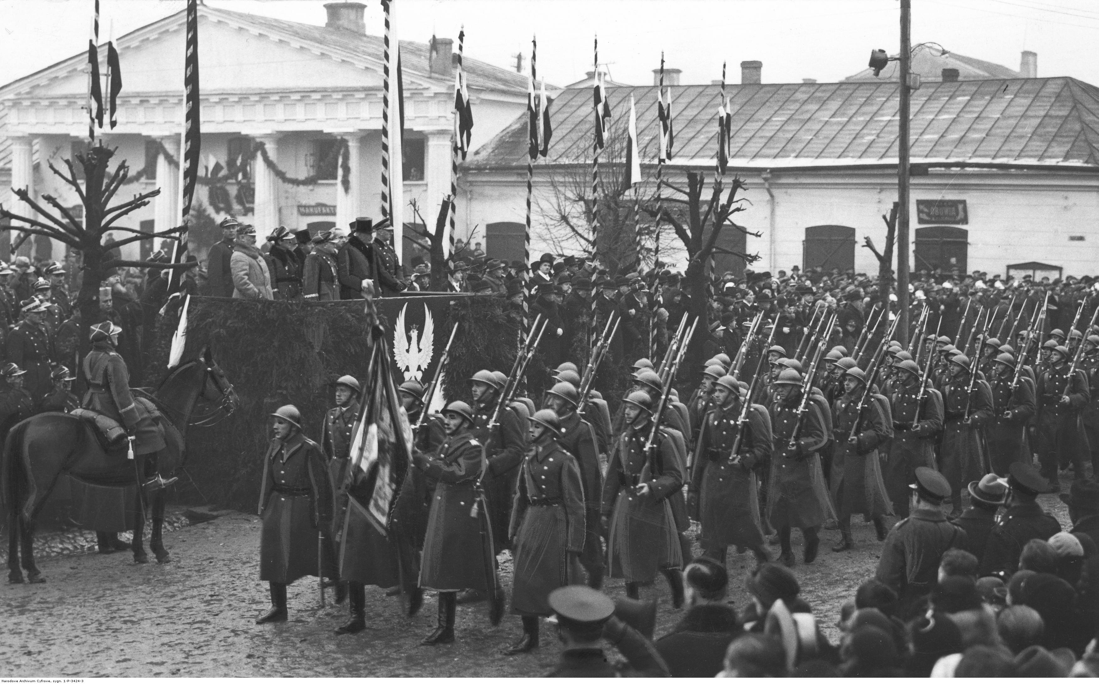 Obchody 400 rocznicy urodzin króla Stefana Batorego w Grodnie; listopad 1933. Fragment defilady 81 Pułku Strzelców Grodzieńskich im. Króla Stefana Batorego. Defiladę odbiera m.in. prezydent RP Ignacy Mościcki. Koncern Ilustrowany Kurier Codzienny - Archiwum Ilustracji. Sygnatura: 1-P-3424-3